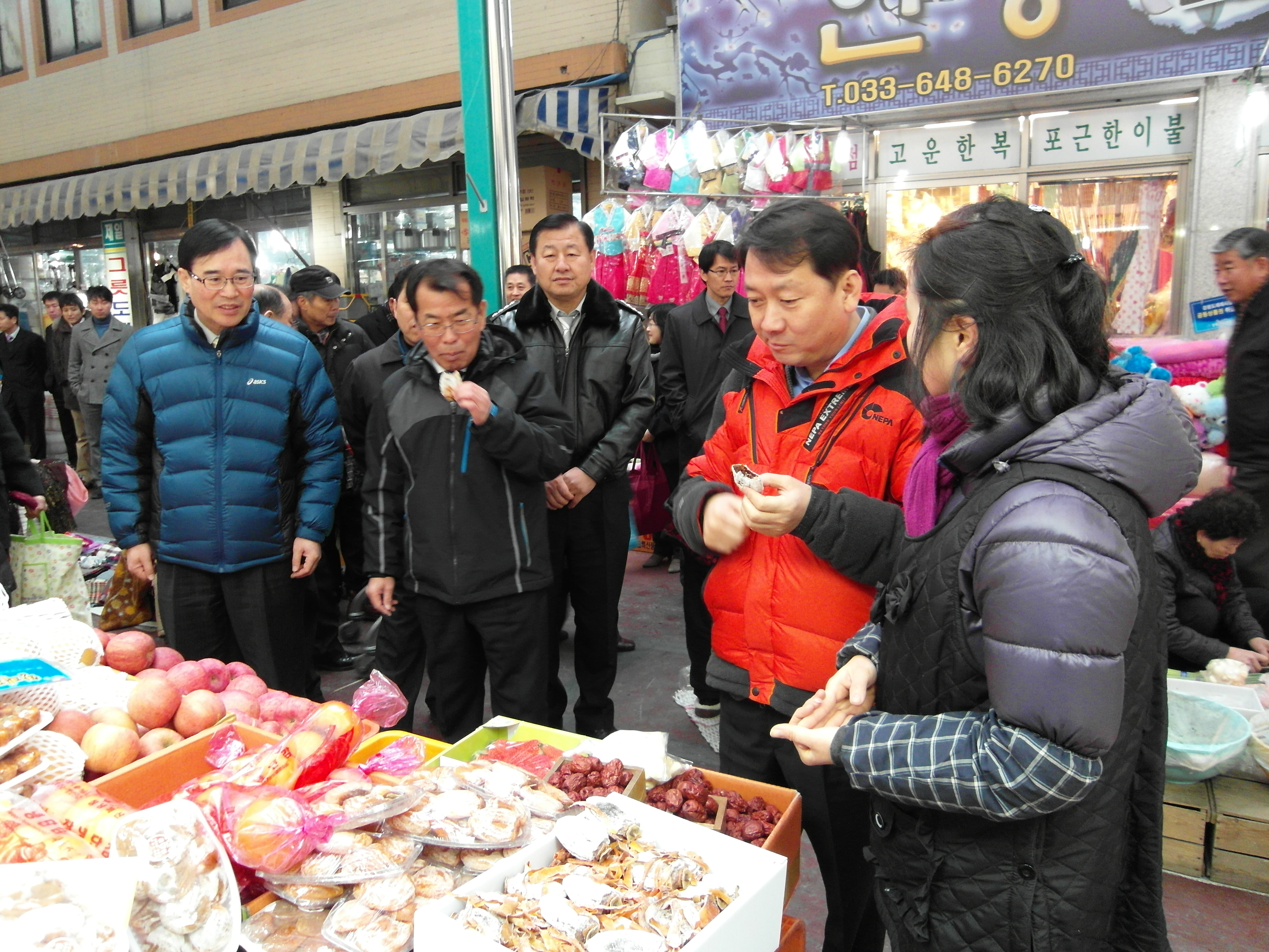 2011년 1월 24일 강원도지사 이광재 강릉중앙시장